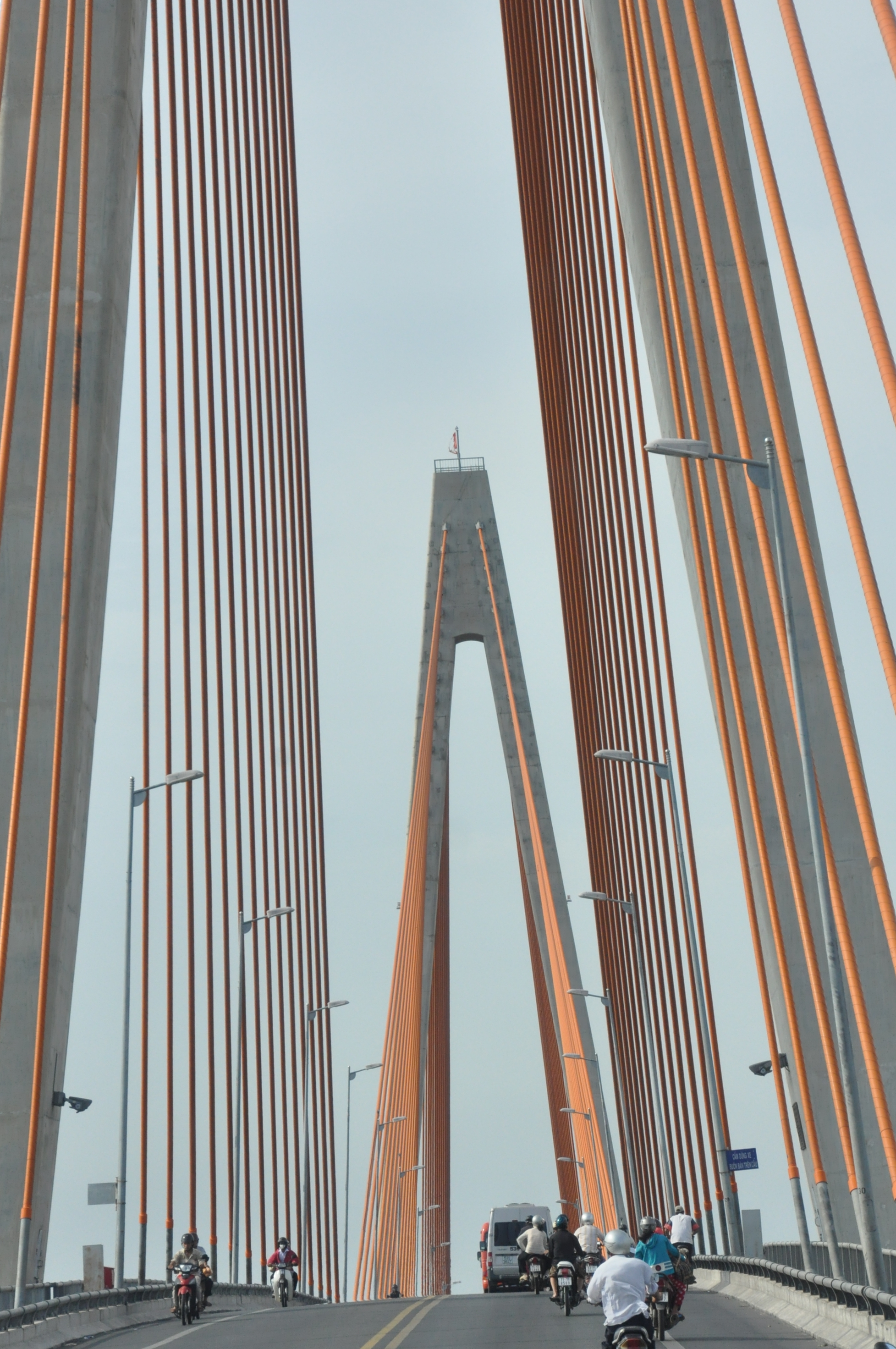 Cầu Rạch Miểu Bến tre, vietnam